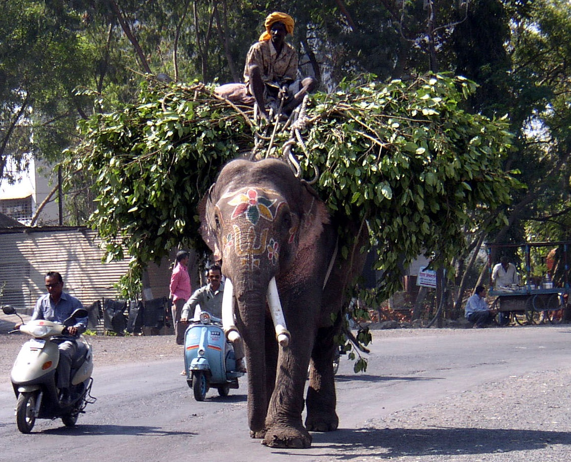 Arbeitselefant in Pune (Indien)